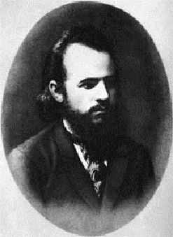 Avenir Evstigneevic Nozdrin (1862-1938)